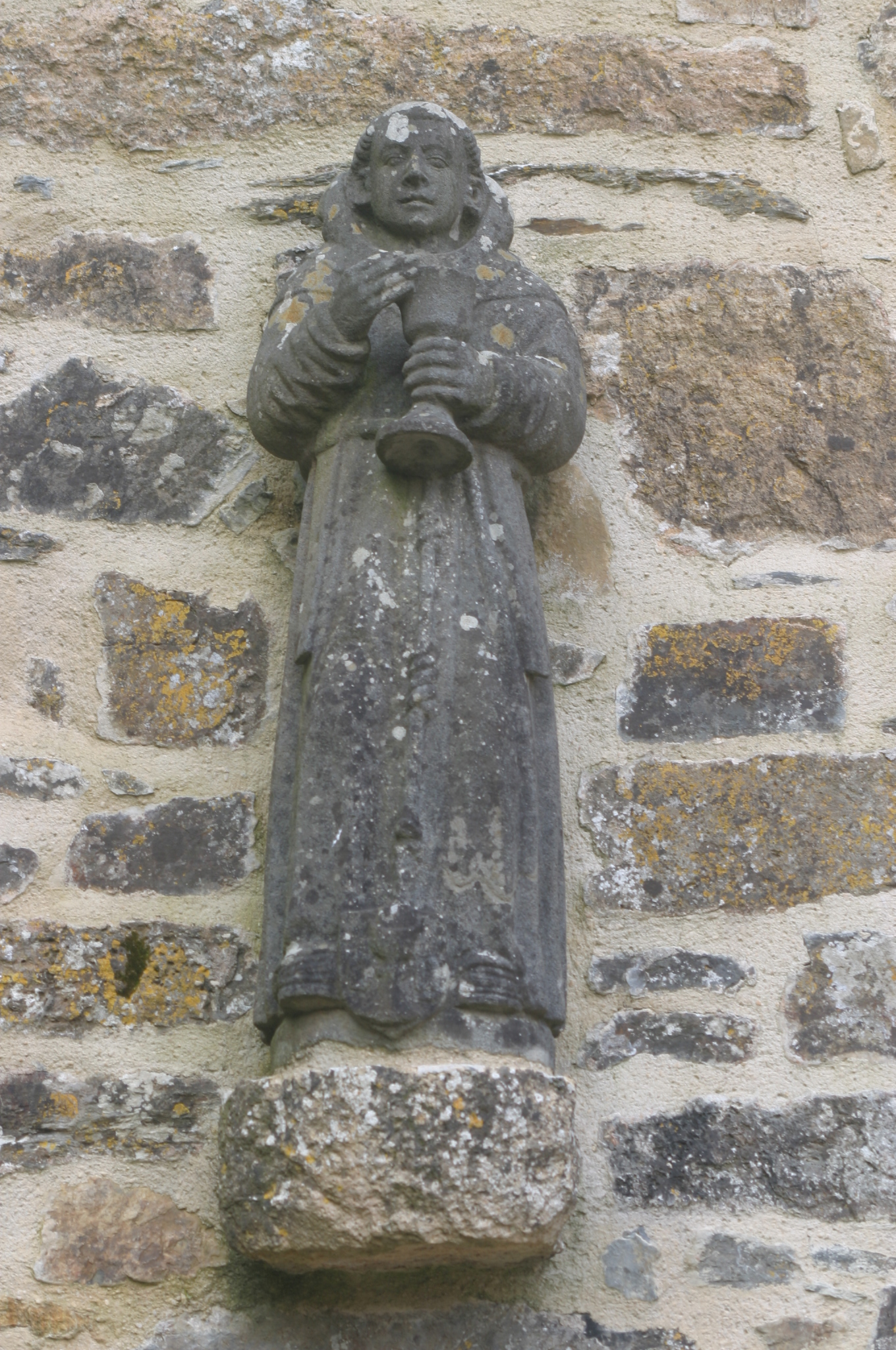 Irvillac. Coatnant Notre-Dame-de-Lorette